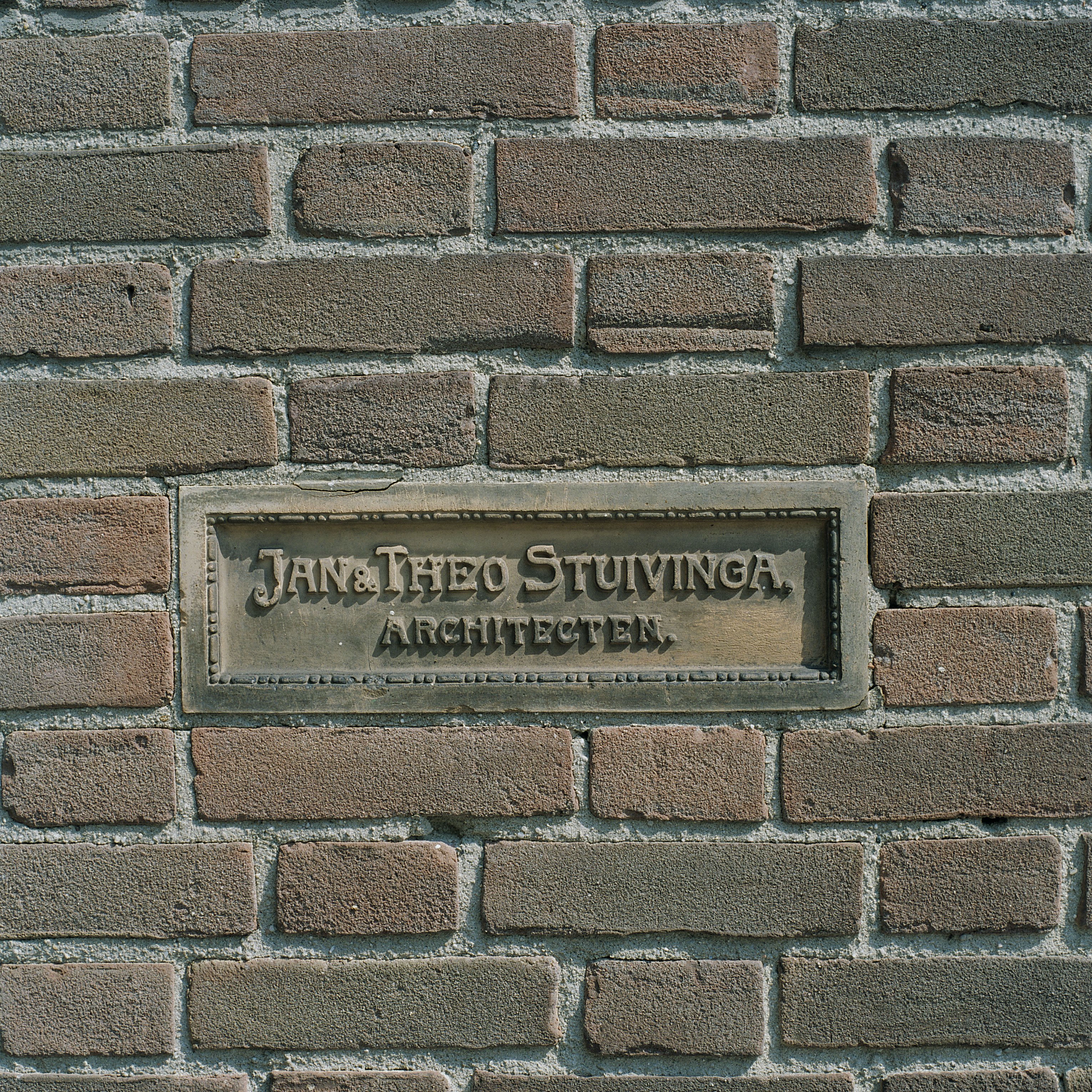 Nederlands Hervormde Kerk: Interieur, gevelsteen in toren. Tekst: Jan & Theo Stuivinga, architecten.